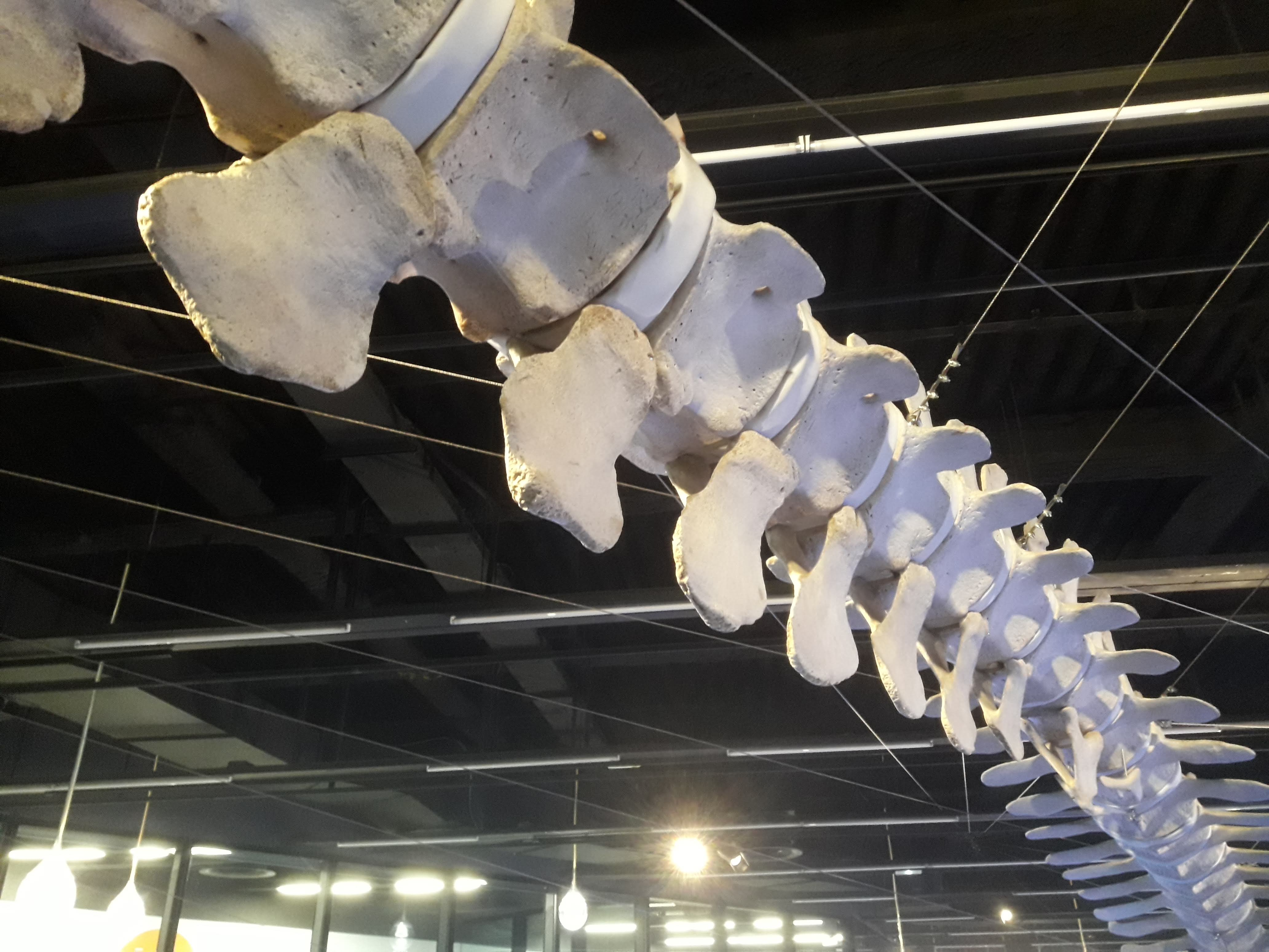 Esquelet de roqual comú (Balaenoptera physalus) a l'entrada del Museu Blau. És l'esquelet d'una balena varada el 1862 a Llança (Alt Empordà).